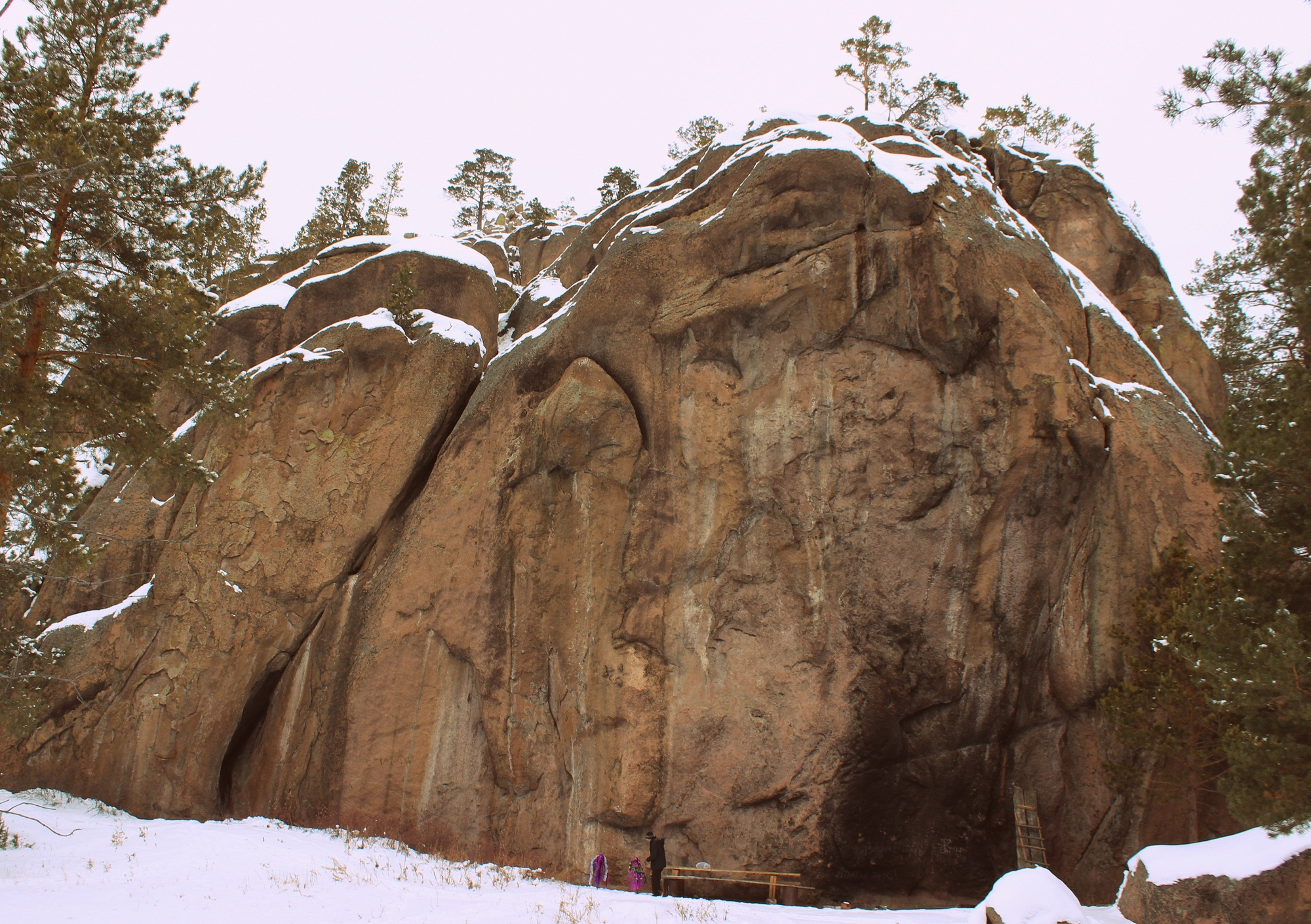 Скала Шаманка. Новая Брянь, Заиграевский район, Бурятия, Сибирь